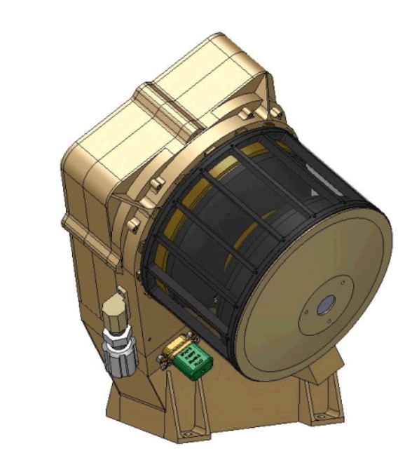 Parker Solar Probe Diagram instrument SWEAP-SPAN-B